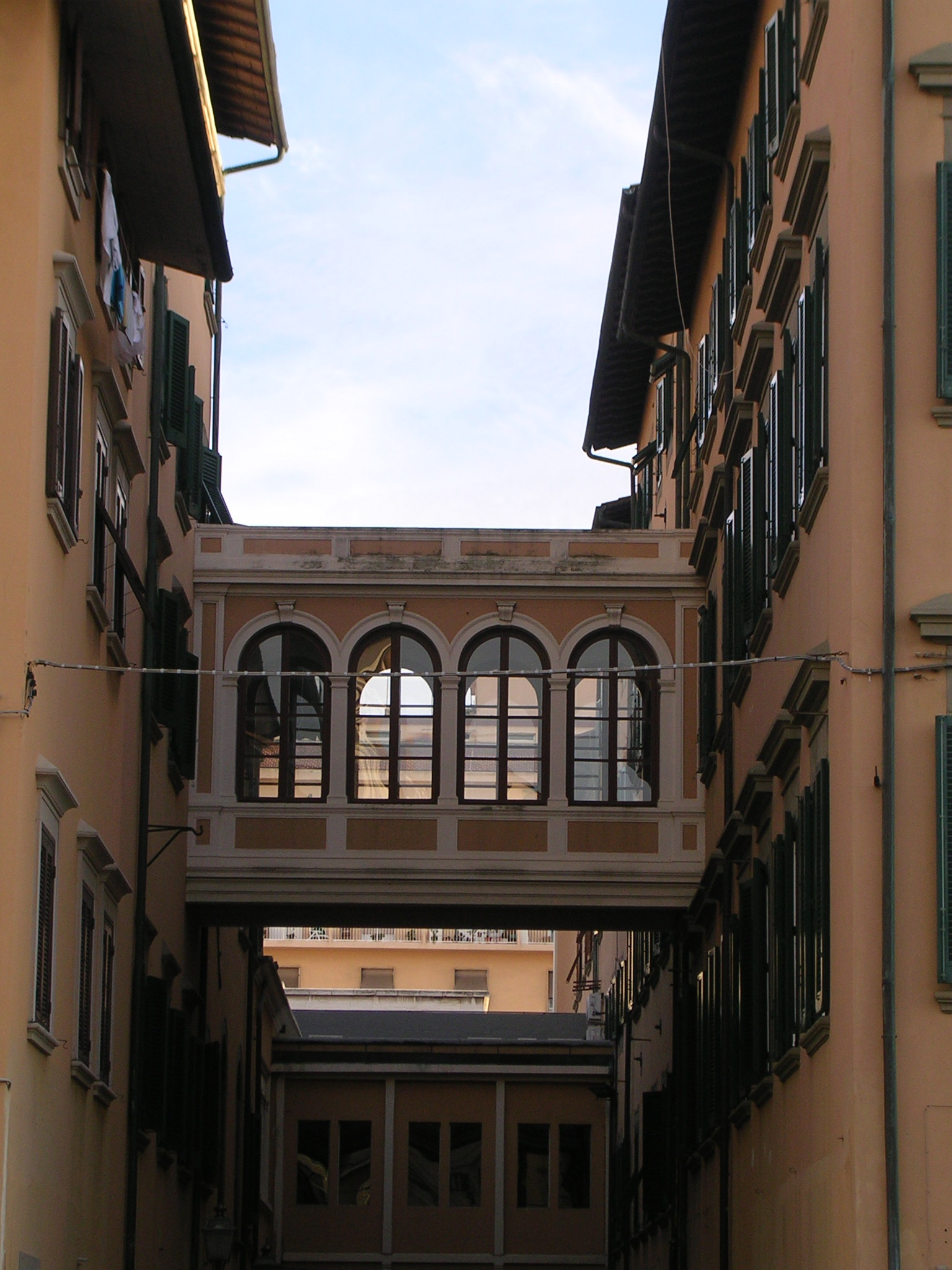 Livorno: il Palazzo Comunale: particolare del ponte di collegamento tra gli edifici lungo Via del Consiglio.